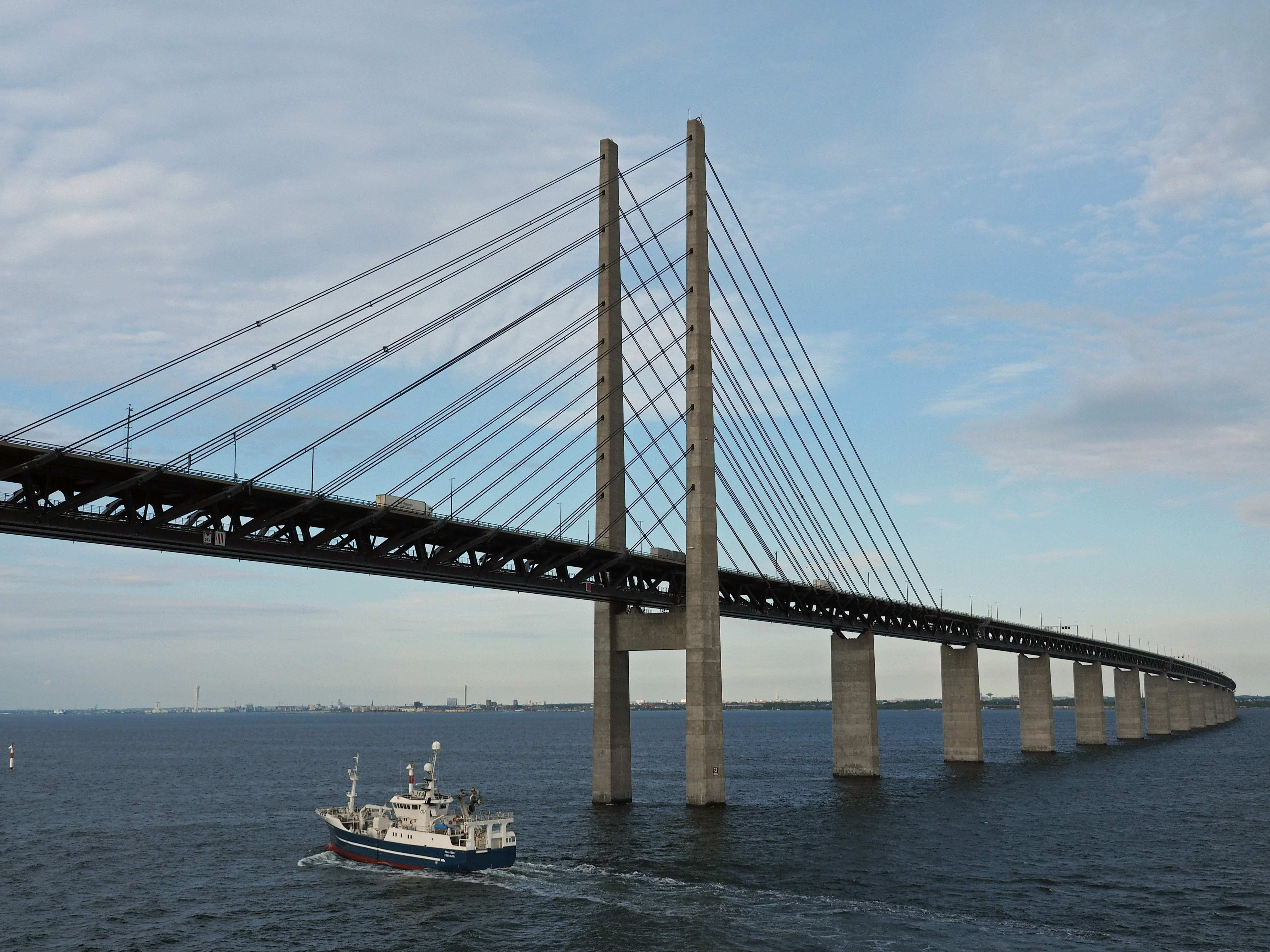 Öresundbrücke Richtung Malmö (R-80-ES Roaldsen nähert sich der Brücke)